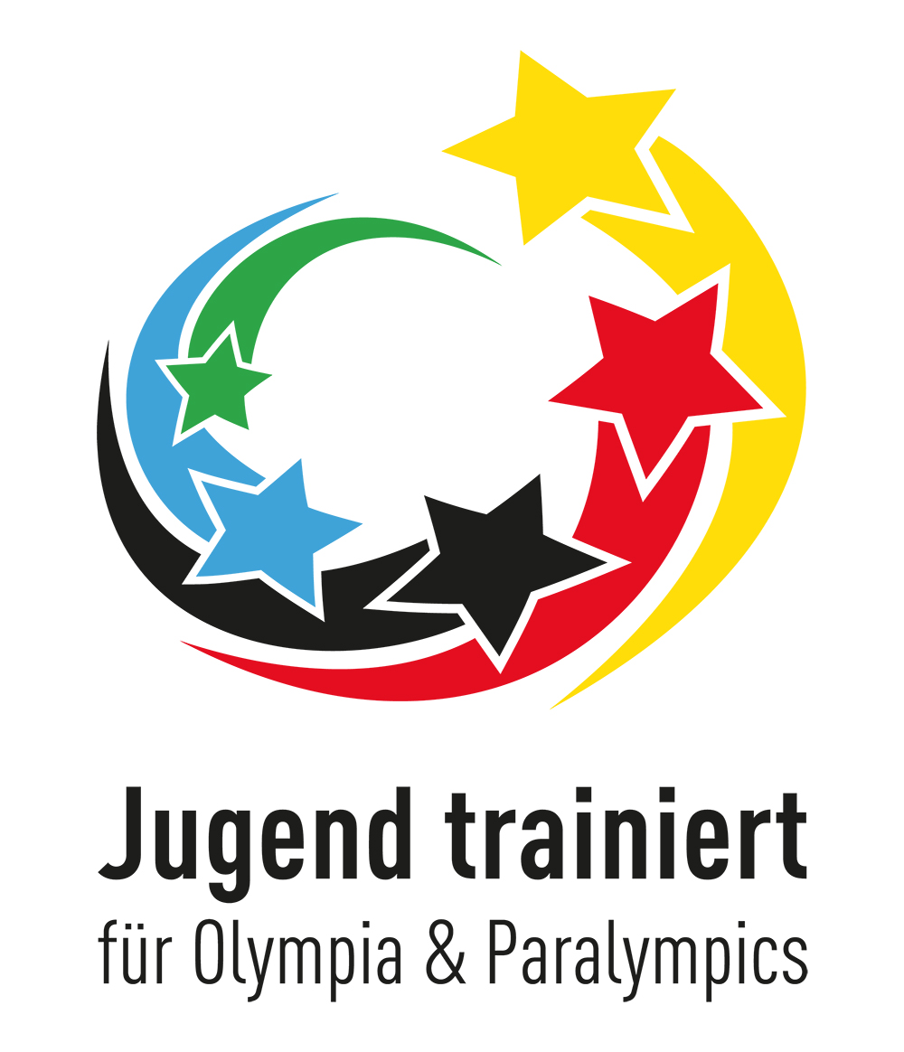 Fünf Sternschnuppen, die ineinander verdreht sind und einen Ring bilden. Die Sternschnuppen haben die Farben grün, blau, schwarz, rot und gelb.